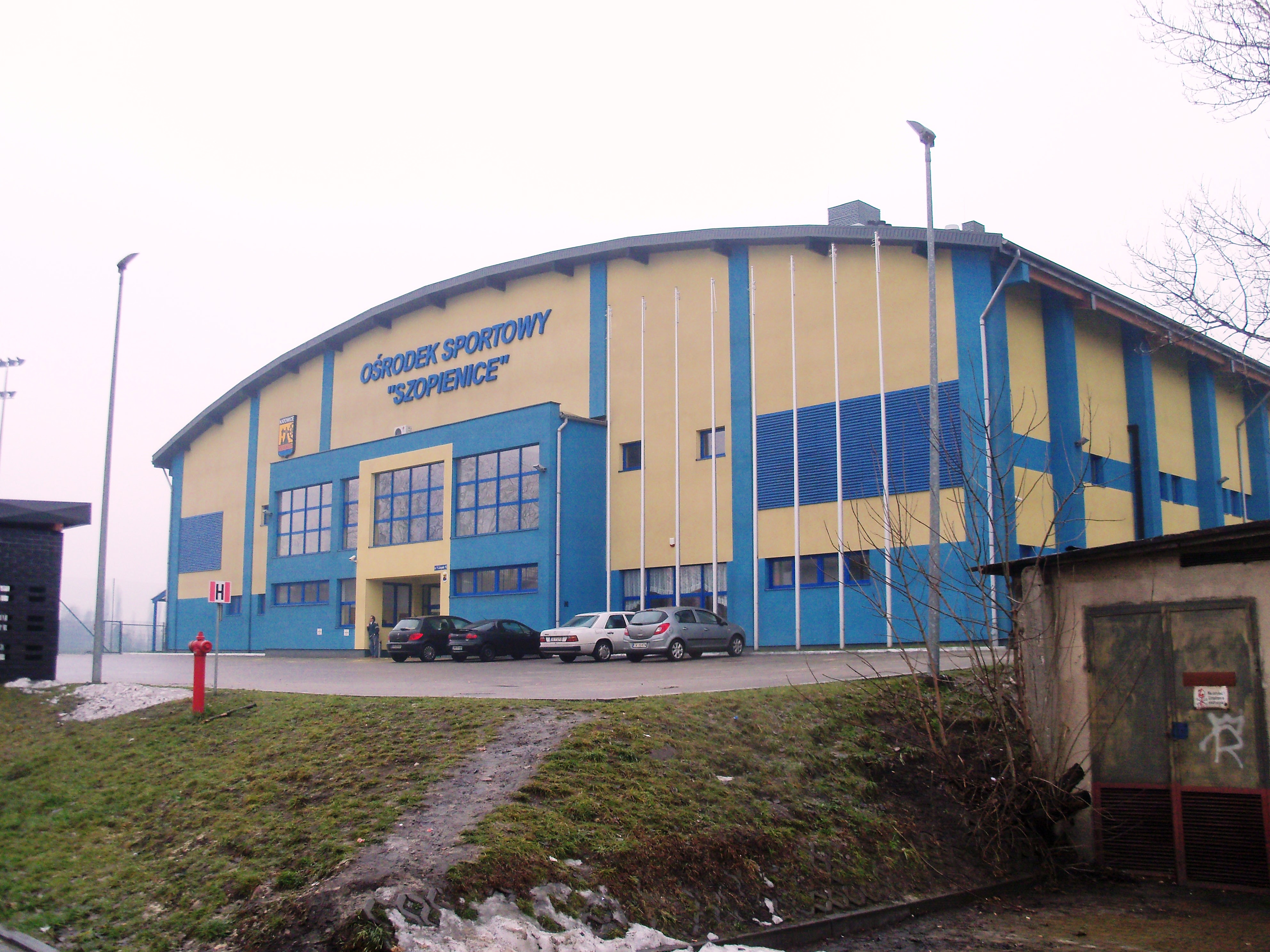 Hala ośrodka sportowego "Szopienice" przy ul. 11 Listopada w Katowicach-Szopienicach